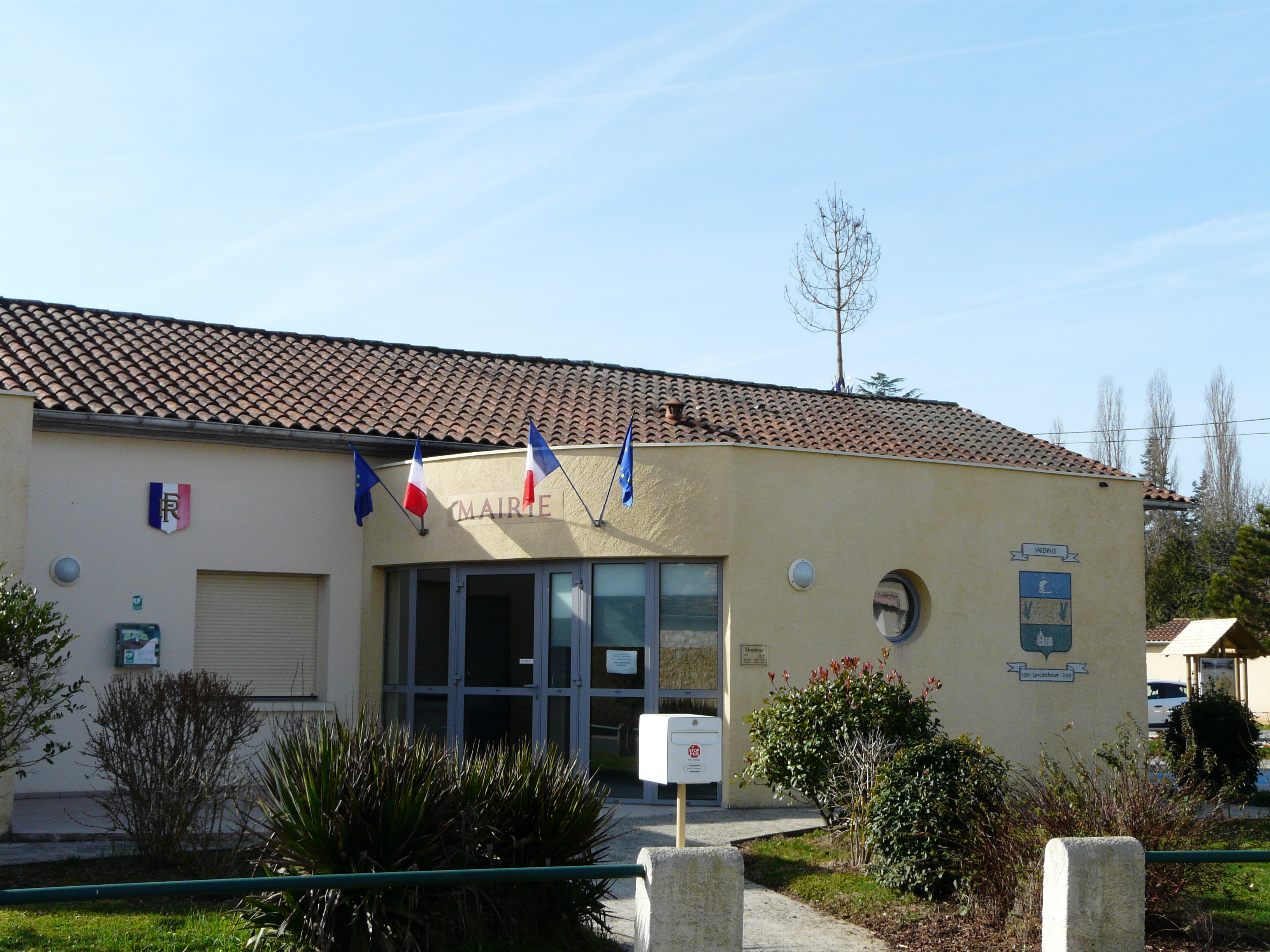 La mairie de Varennes, Dordogne, France.